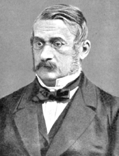 Hans Victor von Unruh, zeitgenössische Darstellung des 1886 verstorbenen deutschen Politikers